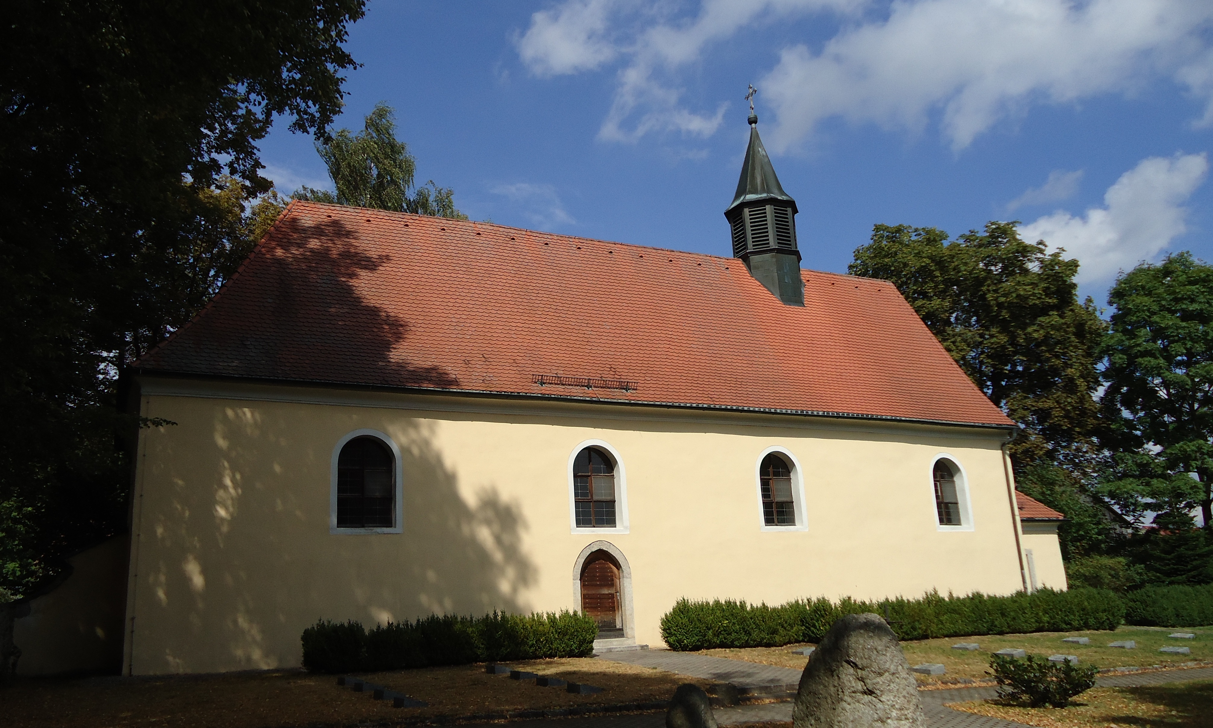 Alte St. Peter-Kirche in Tirschenreuth, 2012